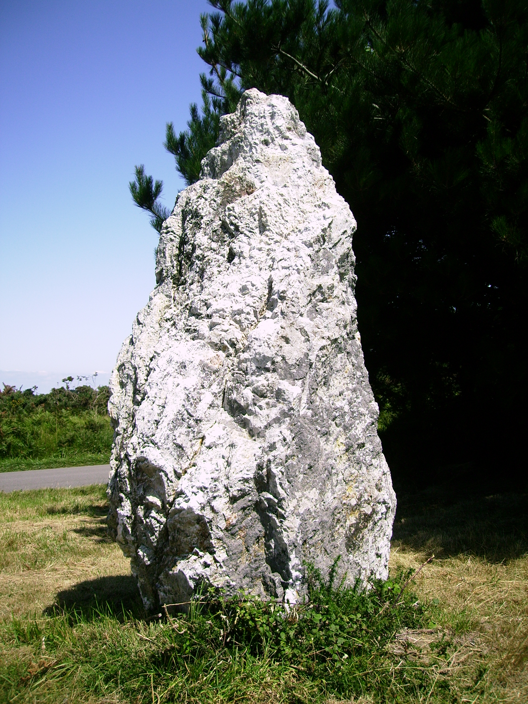 Menhir Pierre Sainte Anne à Bangor (Belle Ile en Mer).